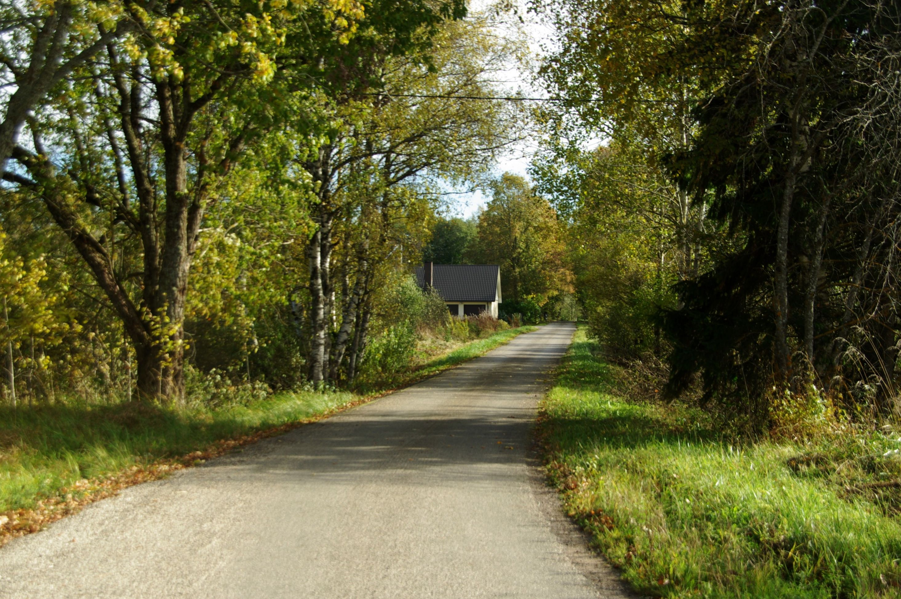 Harju maakond,Rae vald,Suursoo küla